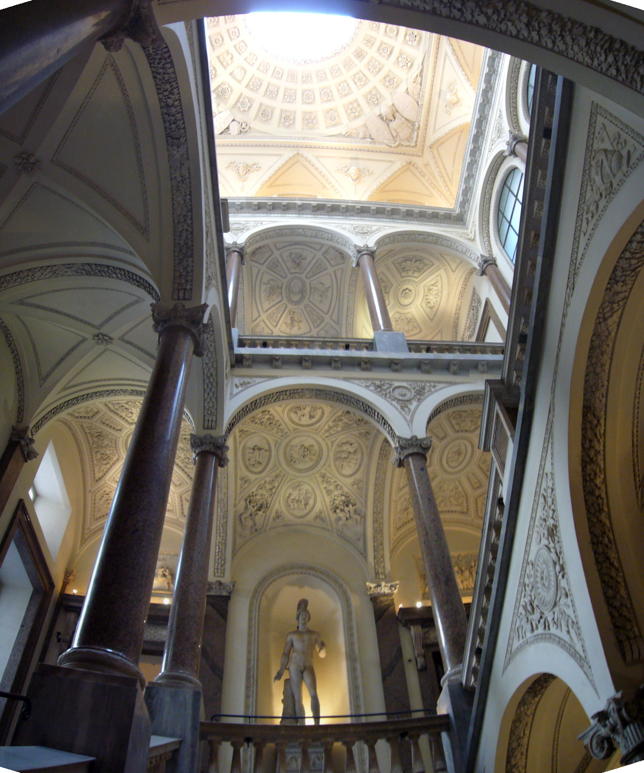 Roma, palazzo Braschi, scalone d'onore